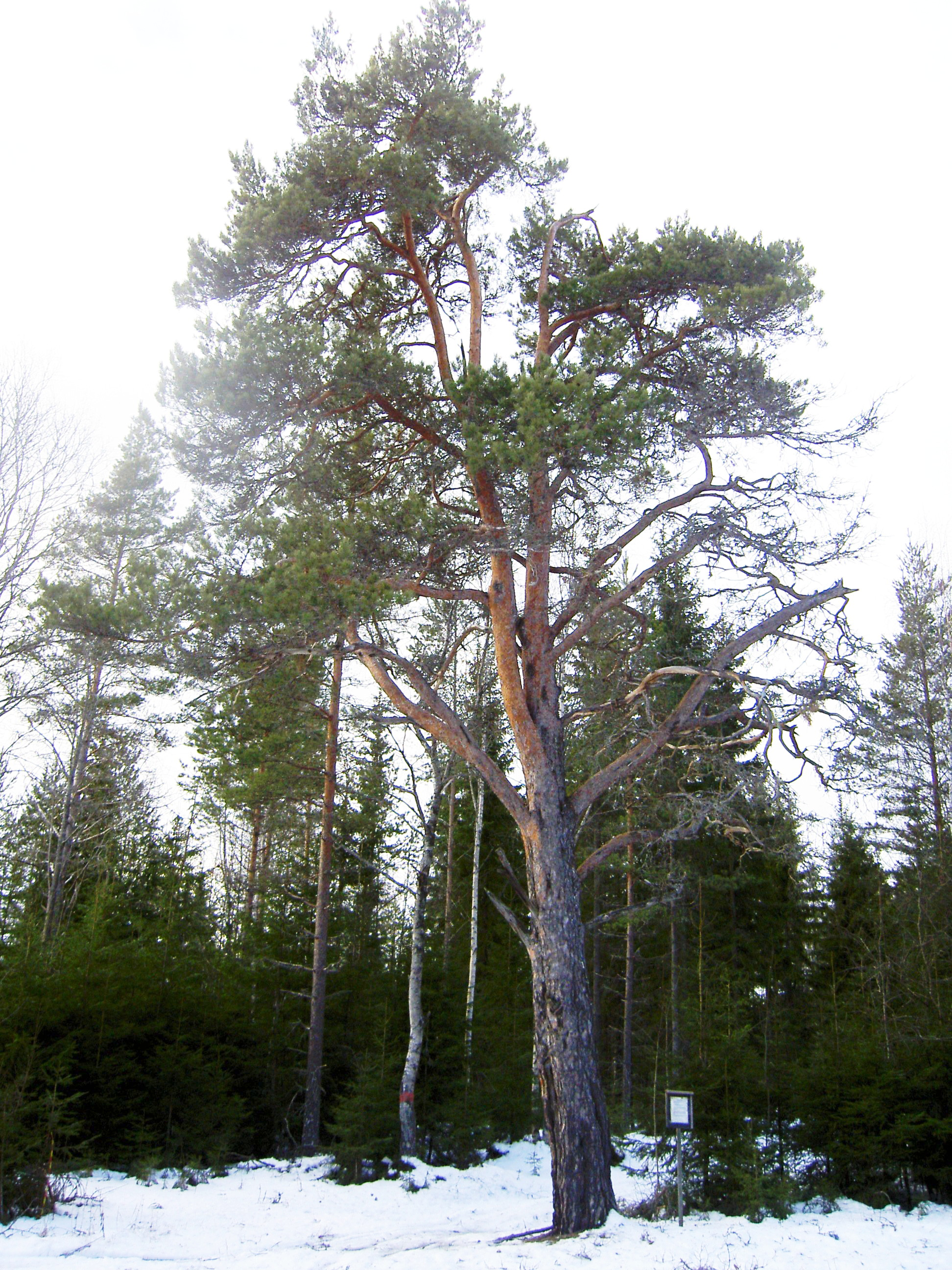 Stolltallen, en tandvärkstall vid Stollbergs gruvor, utanför Smedjebacken. Legenden talar dessutom om ökad chans att finna en partner om man går några varv runt tallen.